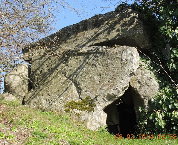 Dolmen côté chevet depuis le bas de la route avec 3 orthostats et la table; arbre sans feuille à gauche et lierre à droite, tumulus en herbe au premier plan